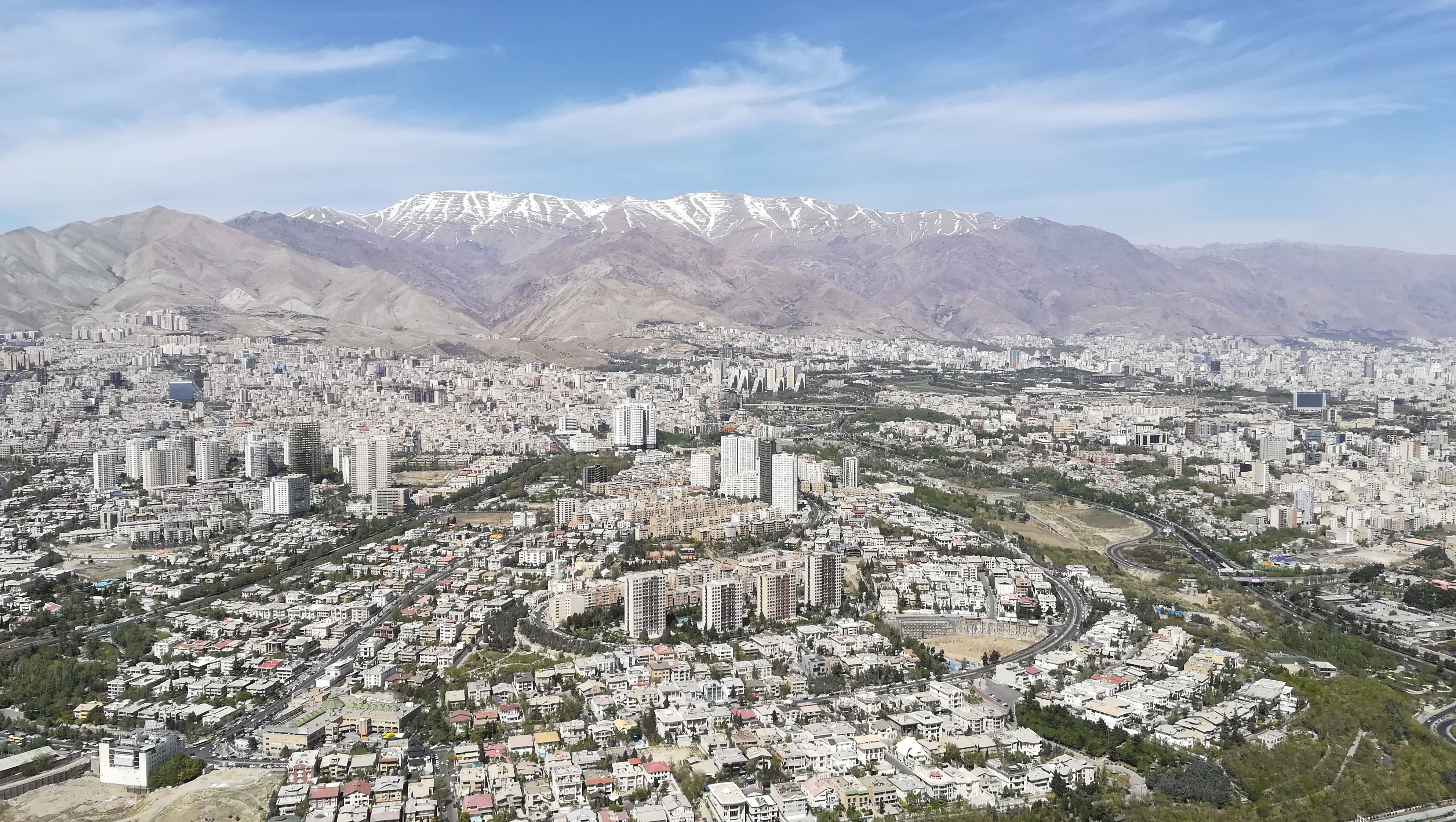 pohled na severní část Teheránu z věže Míládí